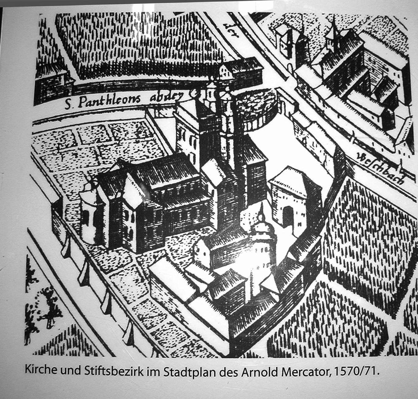 Köln, St. Pantaleon-Mercator-1570